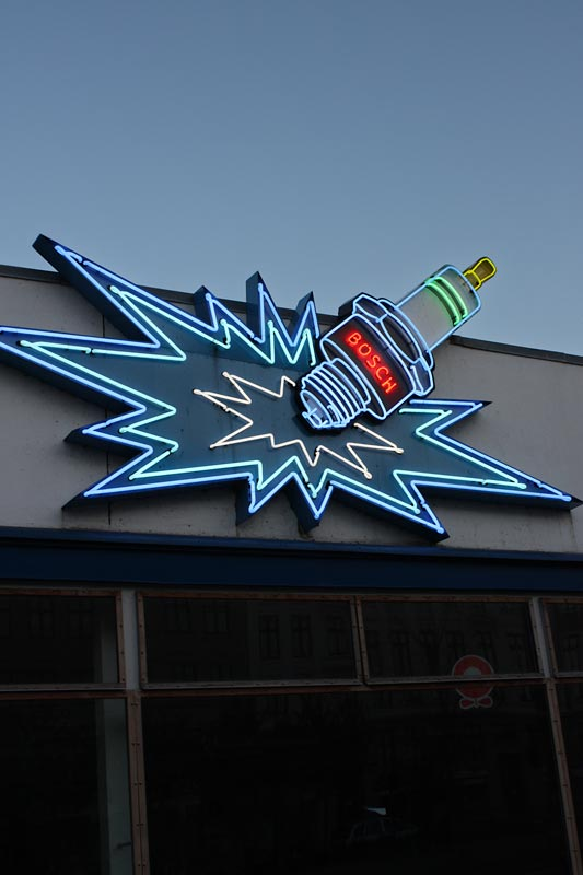 Halmtorvet, Vesterbro KBH. 2008.